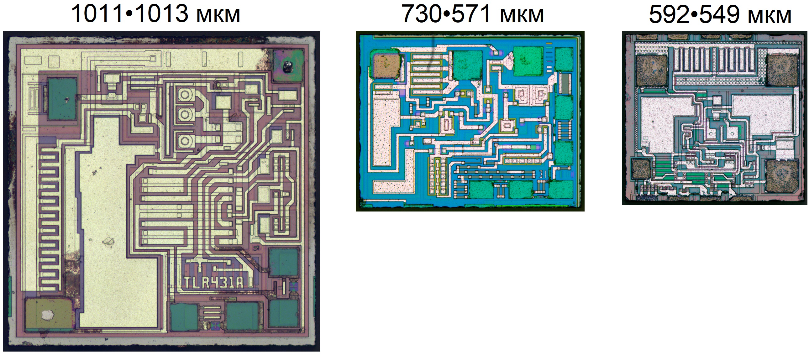 Микрофотографии кристаллов TL431 производства Texas Instruments (слева) и двух иных производителей, в одном масштабе.